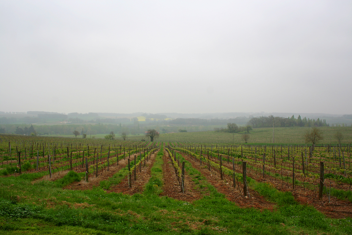 Côtes-de-Saint-Mont Vineyard near Lupiac, Gers, France.